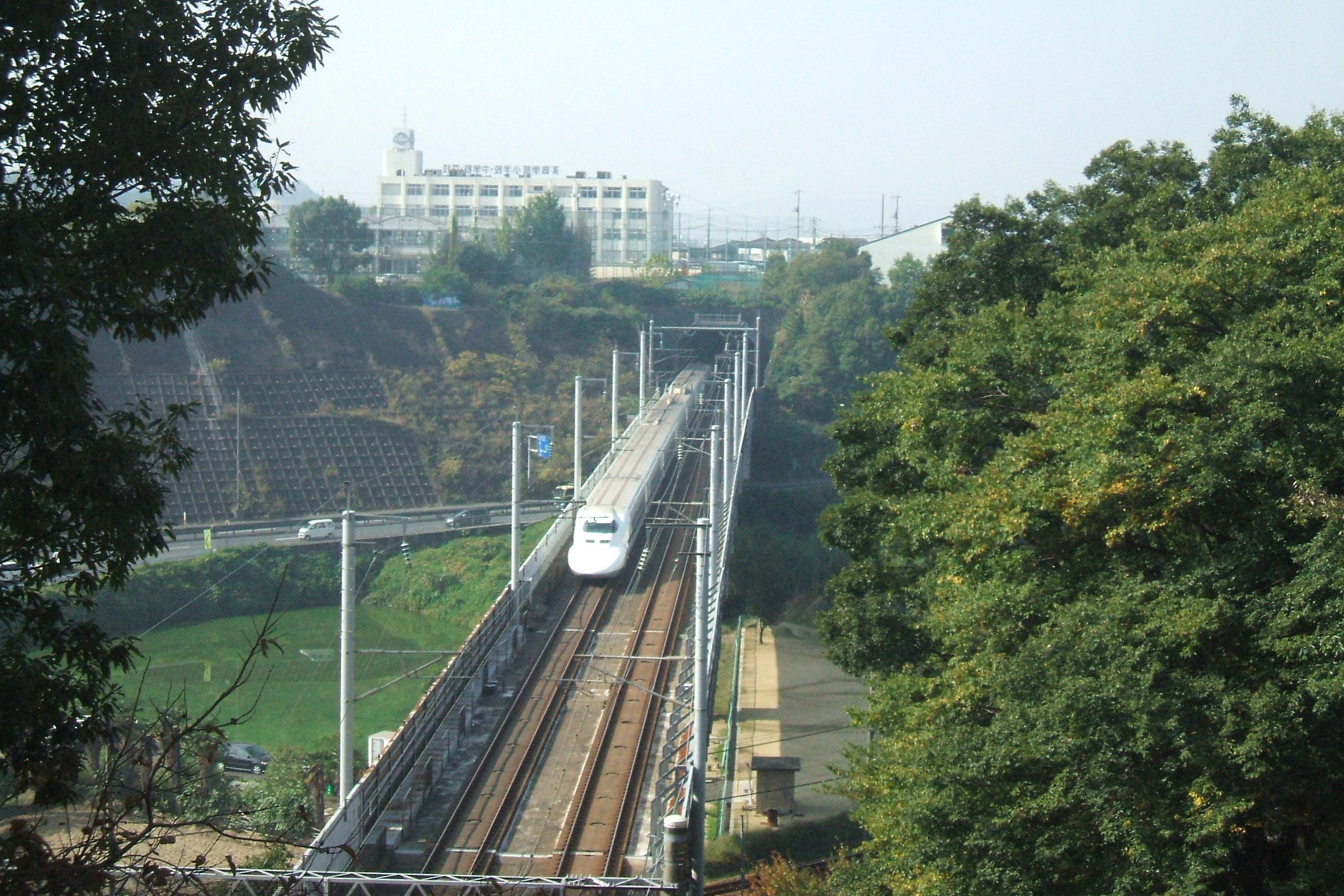 広島県福山市にある山陽新幹線の竹之内トンネル